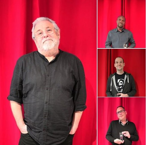 À gauche : Mallock, parrain du Prix 2017. À droite, de haut en bas : Janis Otsiemi (Prix Dora-Suarez 2017) ; Cédric Cham (Prix Spécial Dora-Suarez 2017) ; Ludovic Bouquin (Prix du Premier Roman Dora-Suarez 2017).